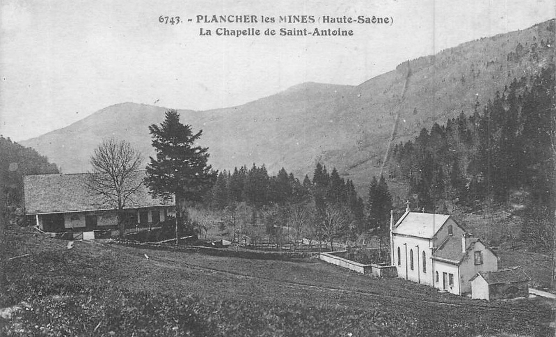 La chapelle Saint-Antoine située à Plancher-les-mines en Haute-Saône.